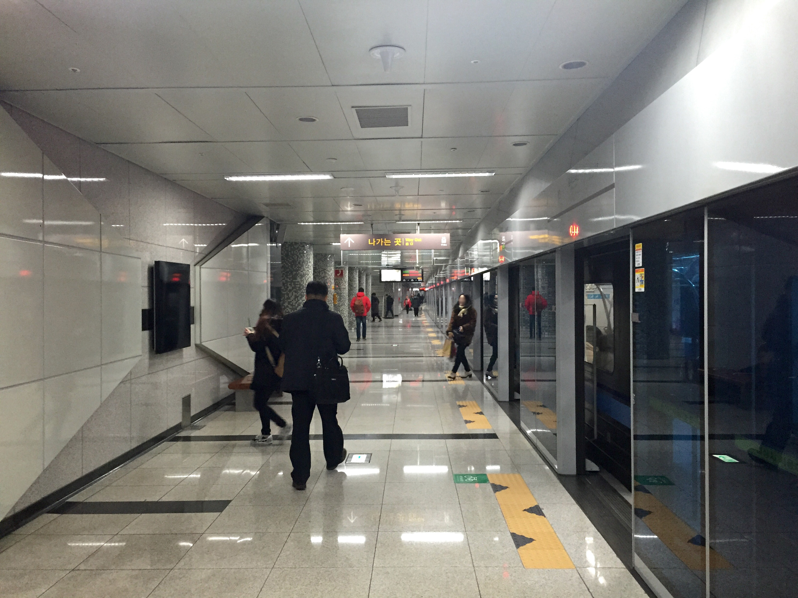 인천1호선 캠퍼스타운역 승강장